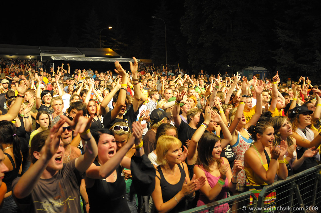 Fotografie od petra honse, při vystoupení kapely tatabojs na hlavní scéně z roku 2009